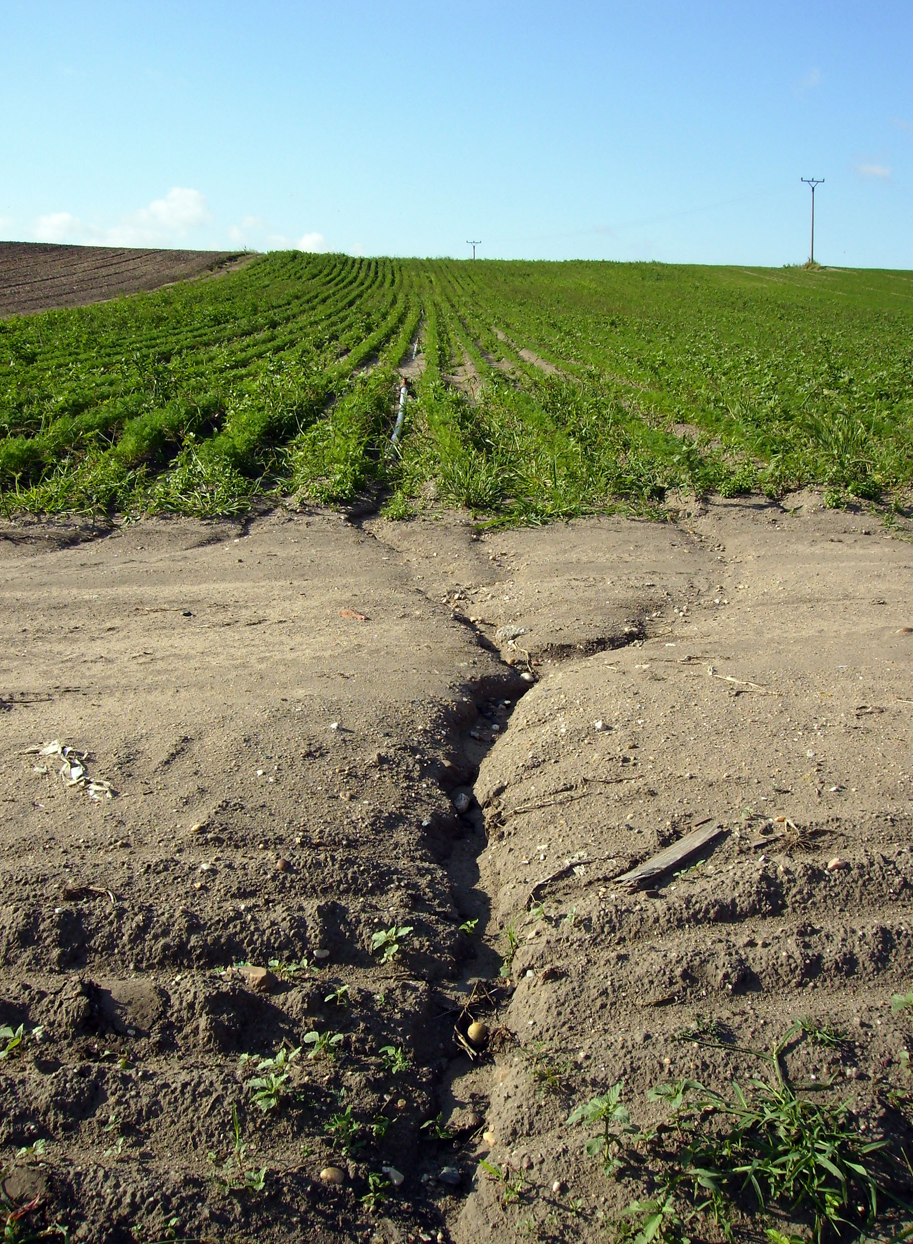 Eroze způsobená nevhodnou orbou